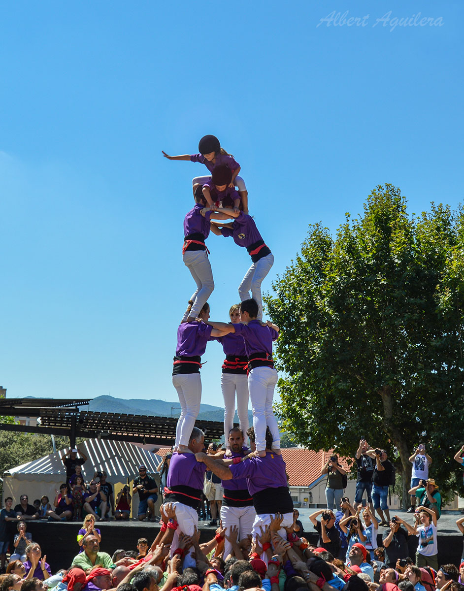 Castell 3d6 dels Manyacs de Parets